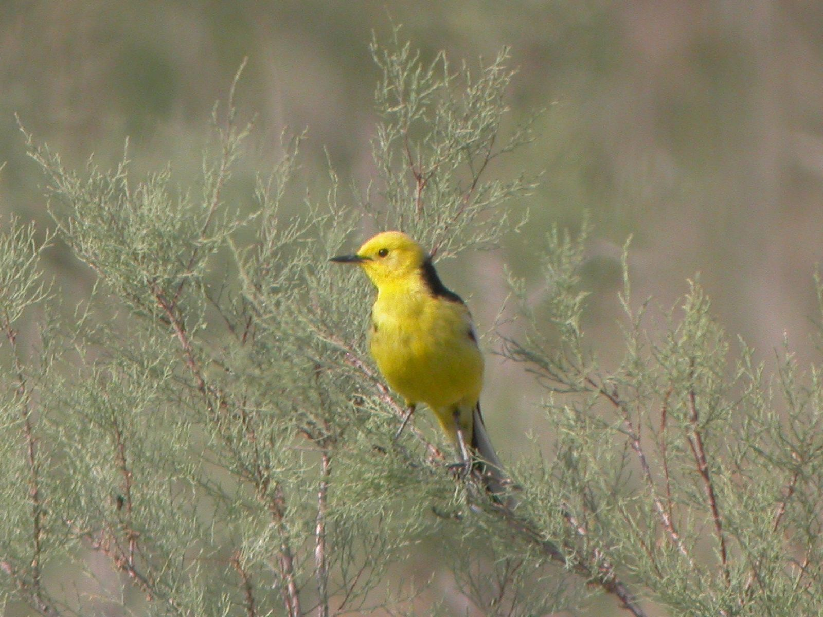 Himalayan Citrine Wagtail (Motacilla citreola calcarata)